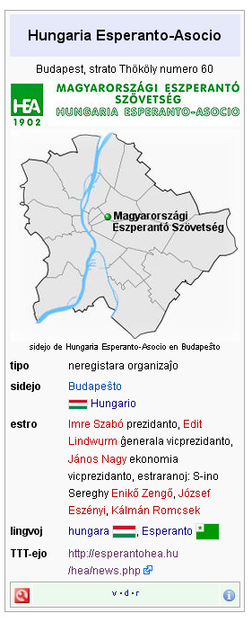 Infokesto de Fondajxo DURA.